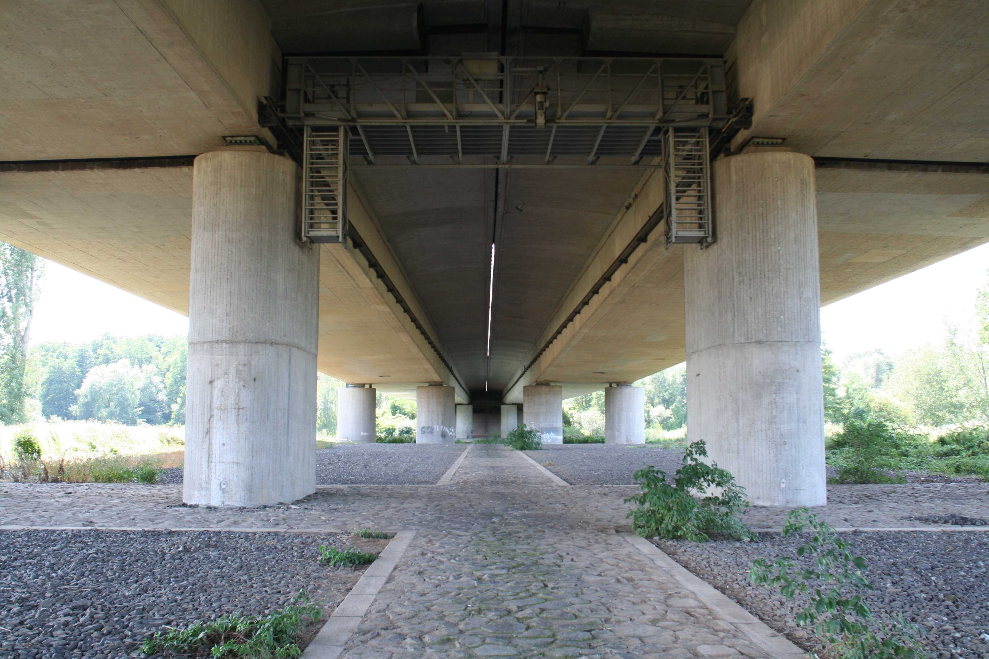 Untersicht der Mainbrücke Mainflingen bei Mainhausen/Kleinostheim